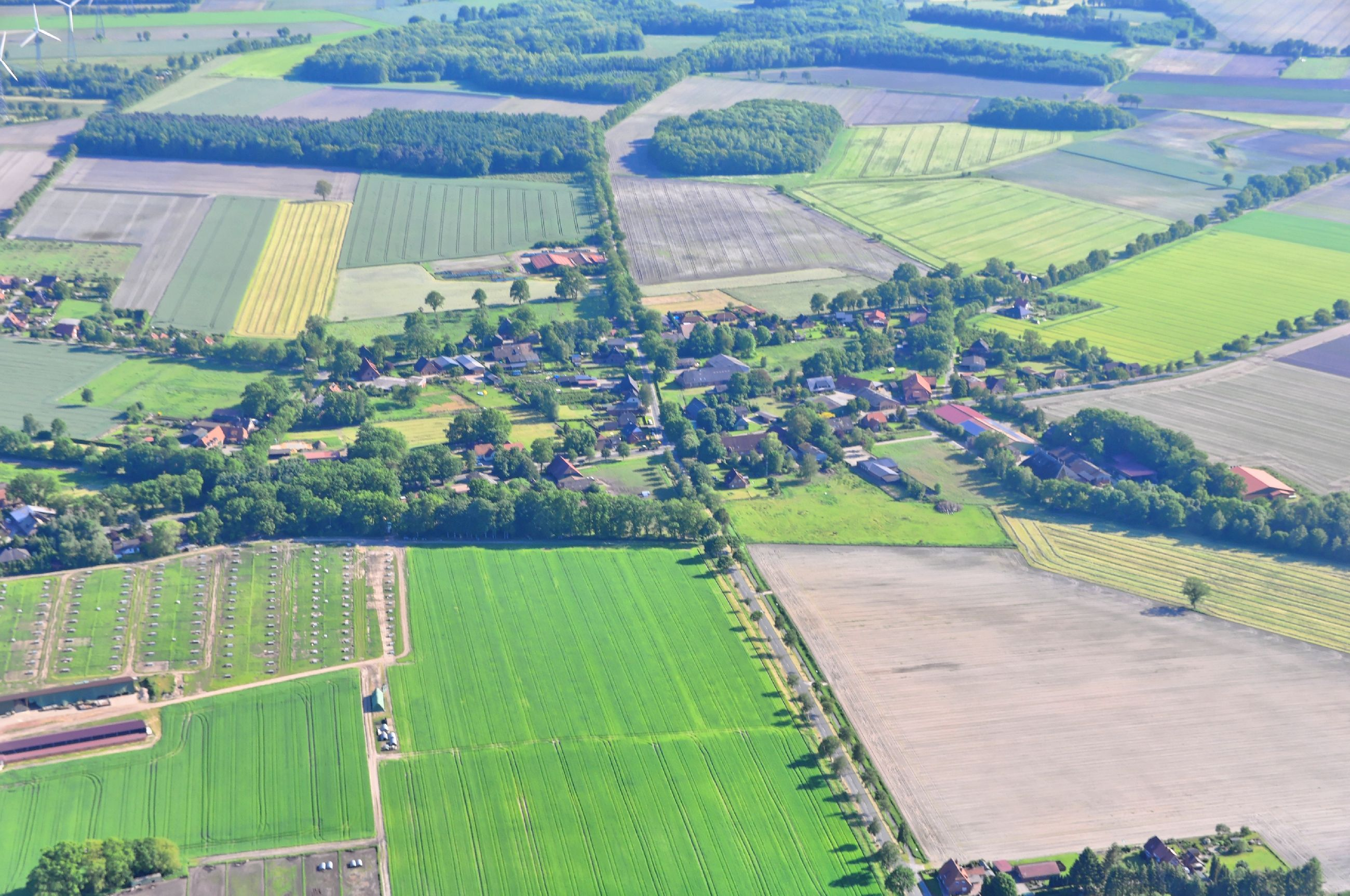 Überführungsflug vom Flugplatz Nordholz-Spieka über Lüneburg, Potsdam zum Flugplatz Schwarzheide-Schipkau